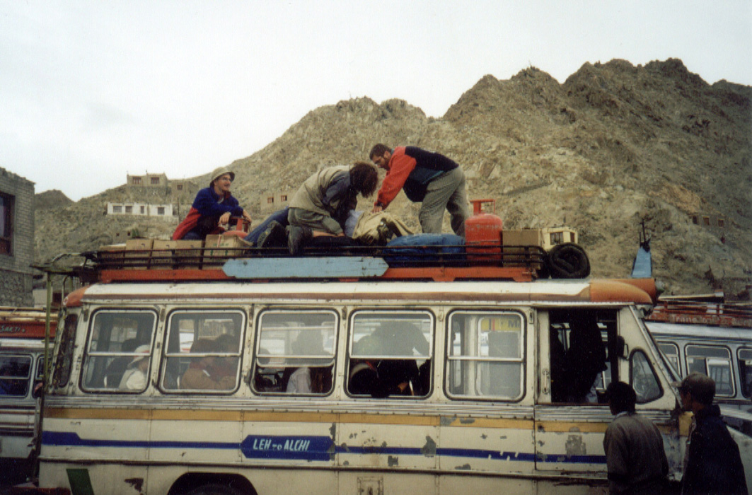 Loading indian bus in Leh, (Ladakh, India)